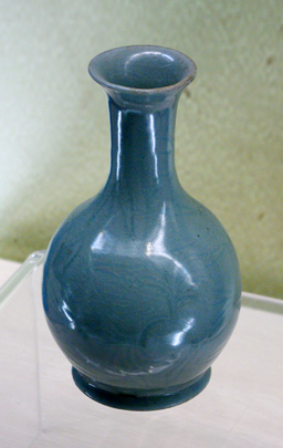 汝窑天蓝釉刻花鹅颈瓶; note the blue here is much darker than in the museum's own photo - see their page